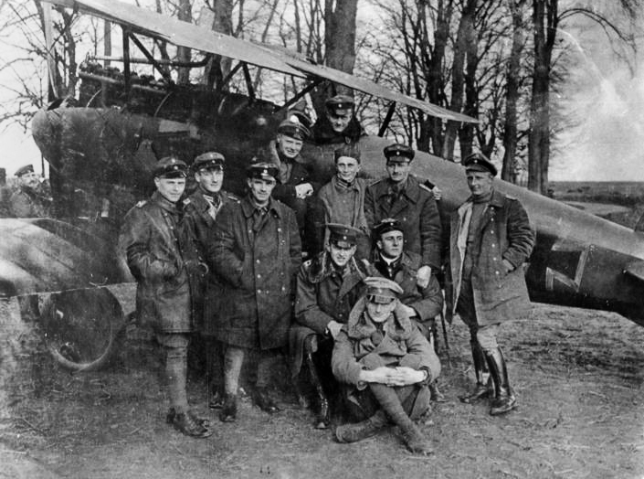 Jagdstaffel 11, Manfred v. Richthofen "Die berühmte Jagdstaffel 11 mit Manfred v. Richthofen am Steuer seines "Roten Flugzeuges". Aus dieser Jagdstaffel ist das Jagdgeschwader I, das amtlich den Namen "von Richhofen" führte, hervorgegangen. Während seines einjährigen Bestehens 1917/18 erfocht das Richthofen-Geschwader nicht weniger als 1.000 Siege. Rittmeister von Richthofen, Träger des Ordens Pour le Merite, war mit 25 Jahren Kommandeur des Geschwaders geworden, das an dem Frontabschnitt, wo es eingesetzt wurde, nach einem militärischen Ausspruch den Kampfwert mehrerer Divisionen besass." Abgebildete Personen: Richthofen (in der Albatros D.III). Von links nach rechts, stehend: unbekannt (möglicherweise Leutnant Karl Allmenroeder); Hans Hintsch; Vizfeldwebel Sebastian Festner; Leutnant Karl Emil Schaefer; Oberleutnant Kurt Wolff; Georg Simon; Leutnant Otto Brauneck. Sitzend: Esser; Krefft; Leutnant Lothar von Richthofen.(